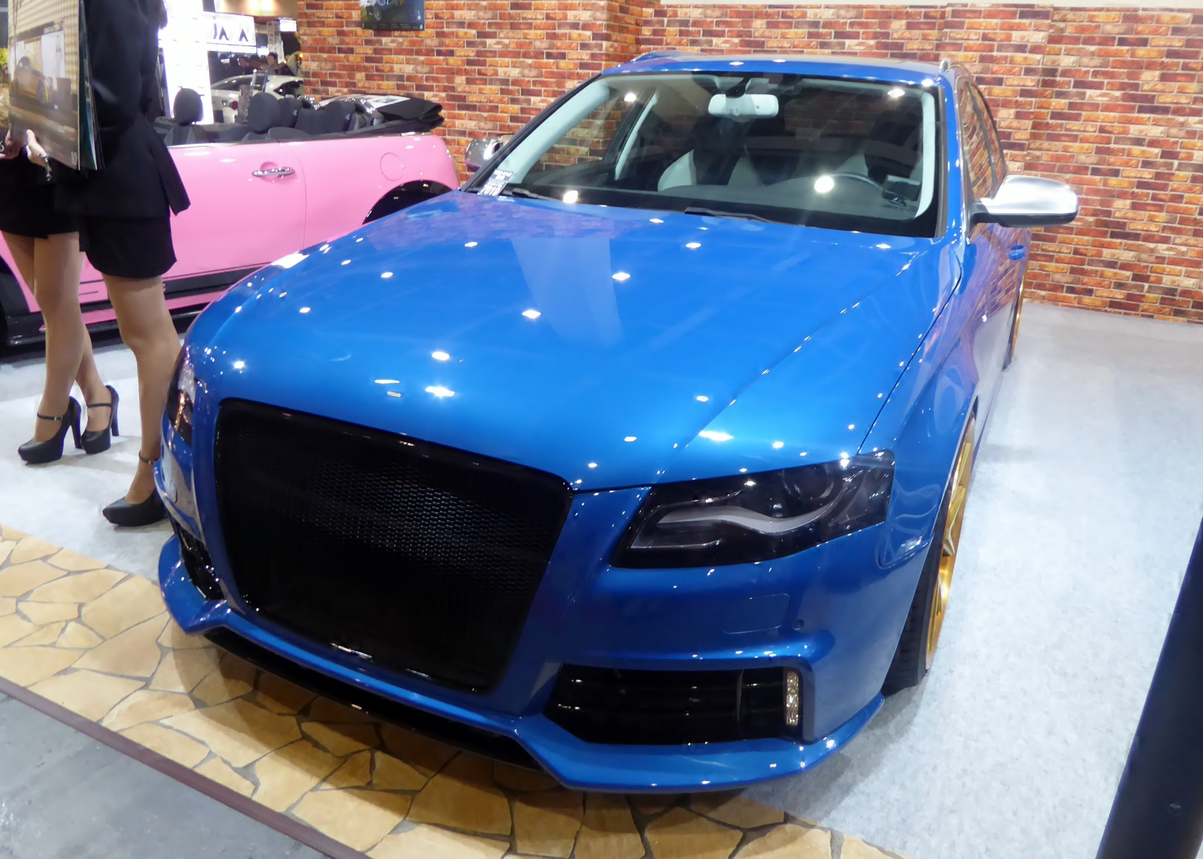 大阪オートメッセ2016においてT's CLUBが出展するB8型アウディ・S4アバントを撮影。